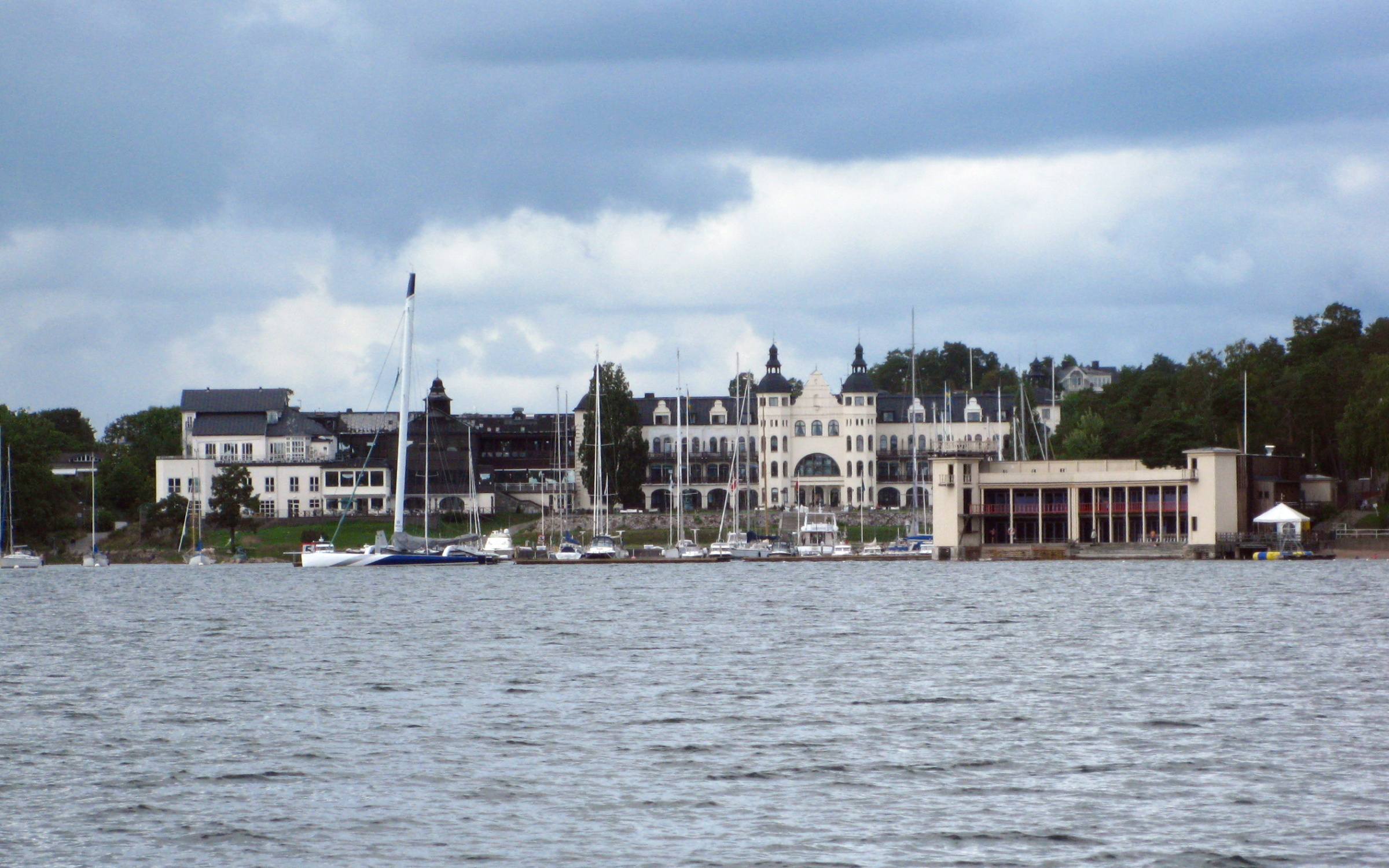 Grand Hotel i Saltsjöbaden. Till höger syns badhuset på Restaurangholmen.